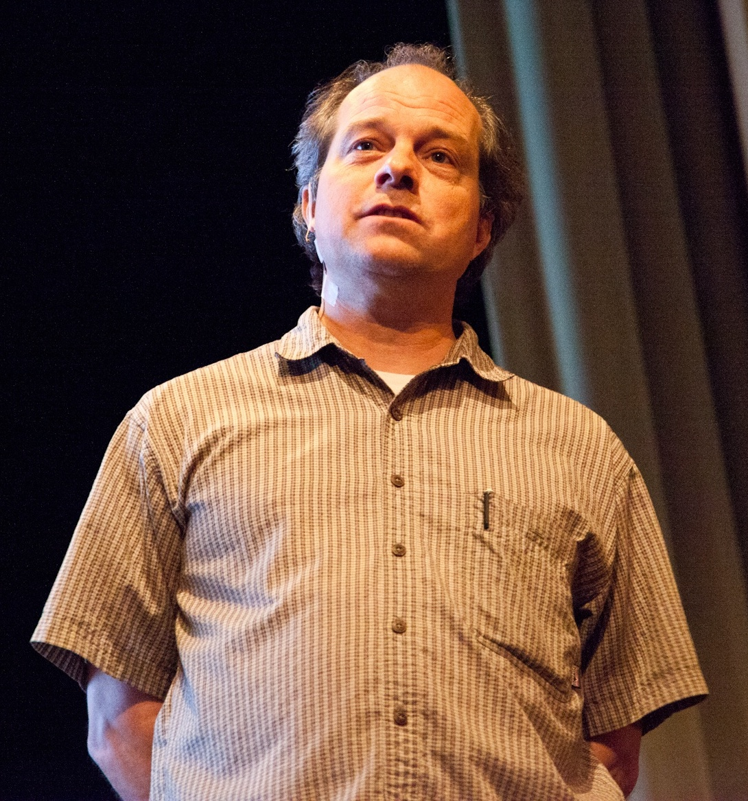 David Littschwager